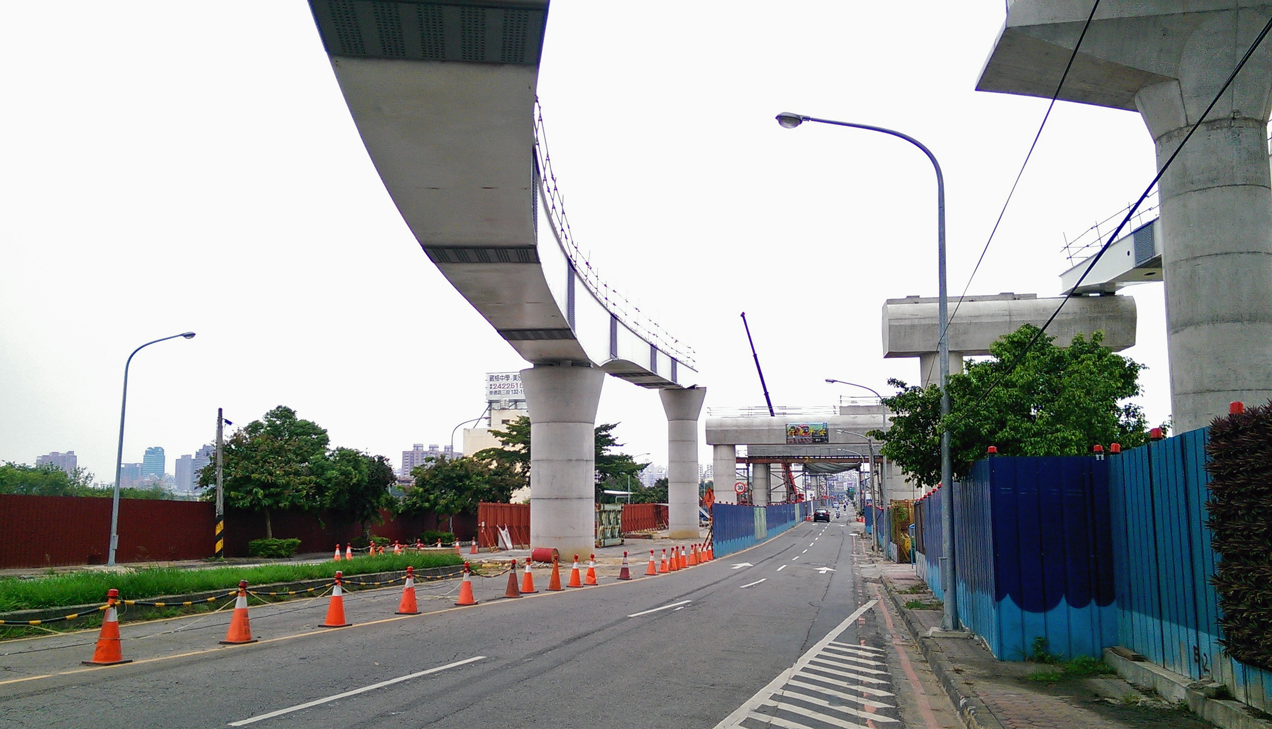 中文（台灣）: 松竹路與台中捷運綠線工程